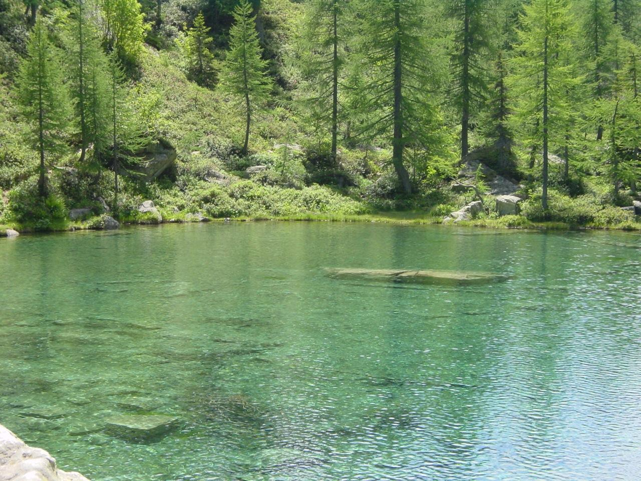 Lago delle Streghe, Parco naturale dell'Alpe Veglia e dell'Alpe Devero, Piemonte, Italia